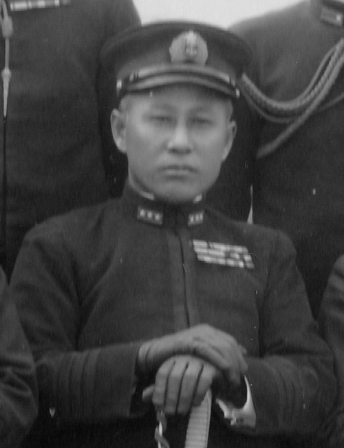 岩村清一海軍中将